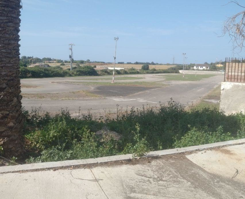 Pista GoKart Ottava, Sassari. Alla data dello scatto l'impianto risultava abbandonato